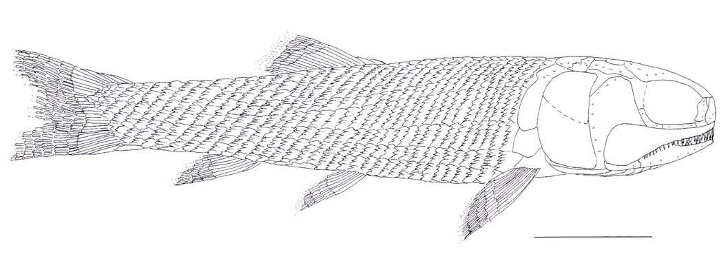 Daninia spinosa gen. n. sp. n. Restoretion. Scale bar: 5 ntm.